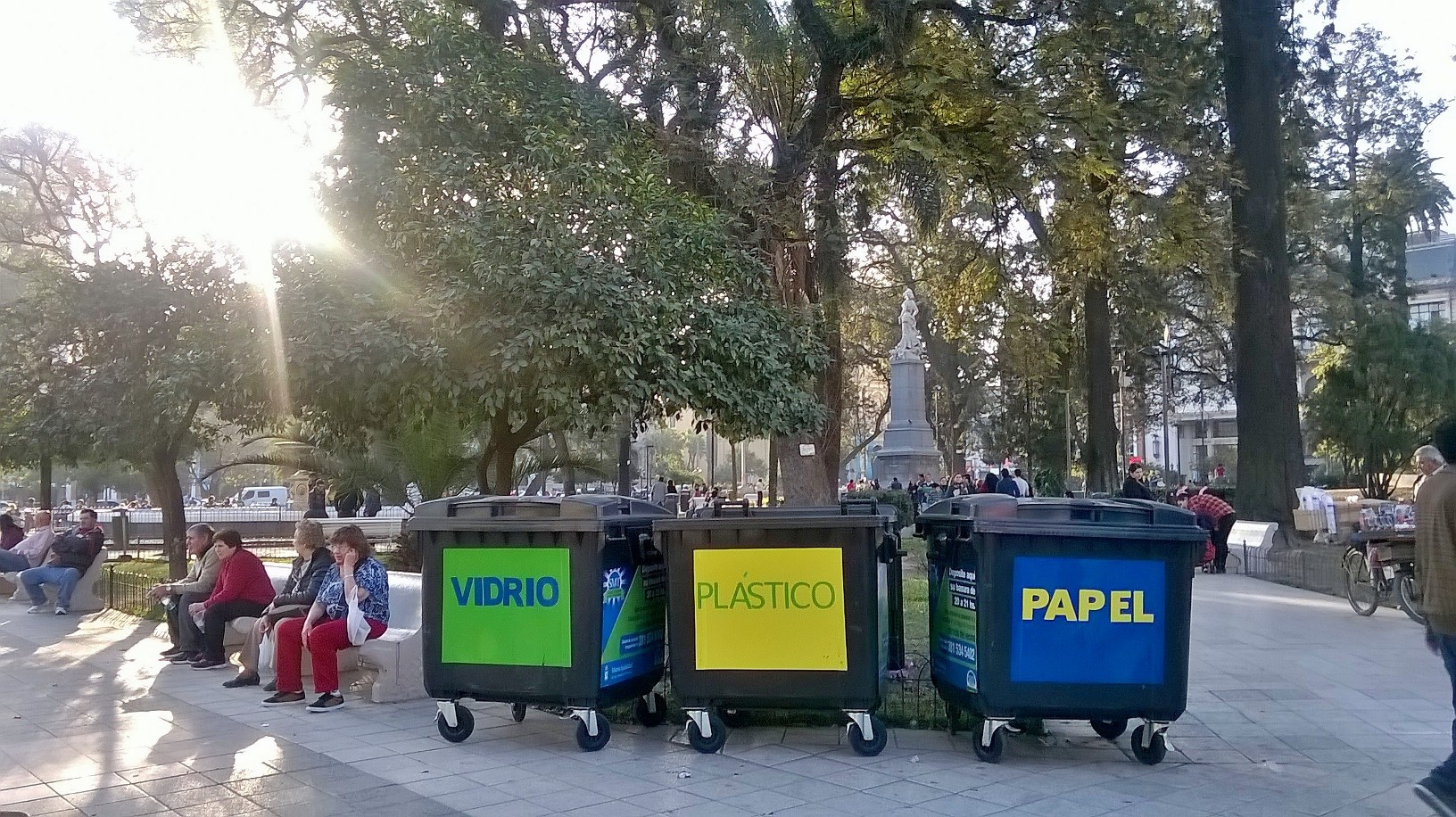 Estos tachos sirven para separar la basura como plástico, vidrio, papel. Usémoslo, no tiremos la basura en la calle, hagamos un esfuerzo para cuidar nuestra cuidad, empezando a cuidar nuestros barrios, las calles donde vivimos. Es importante educar y comprometer a la gente para construir una ciudad mejor, más limpia y ser ciudadanos responsables